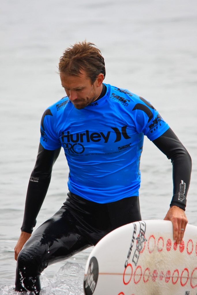 Hurley Pro 2010 - Heat #11 Men's Round 2